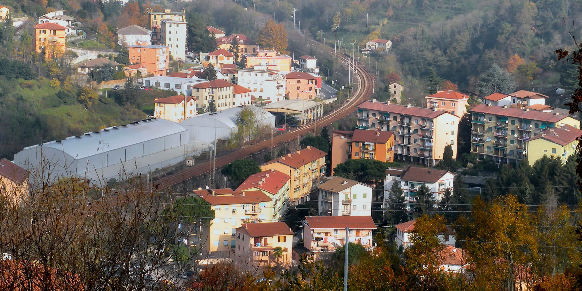 Vedura di Prelo (Serra Riccò, Genova) Foto propria Novembre 2009 Licensing Categoria:Mignanego Categoria:Serra Riccò